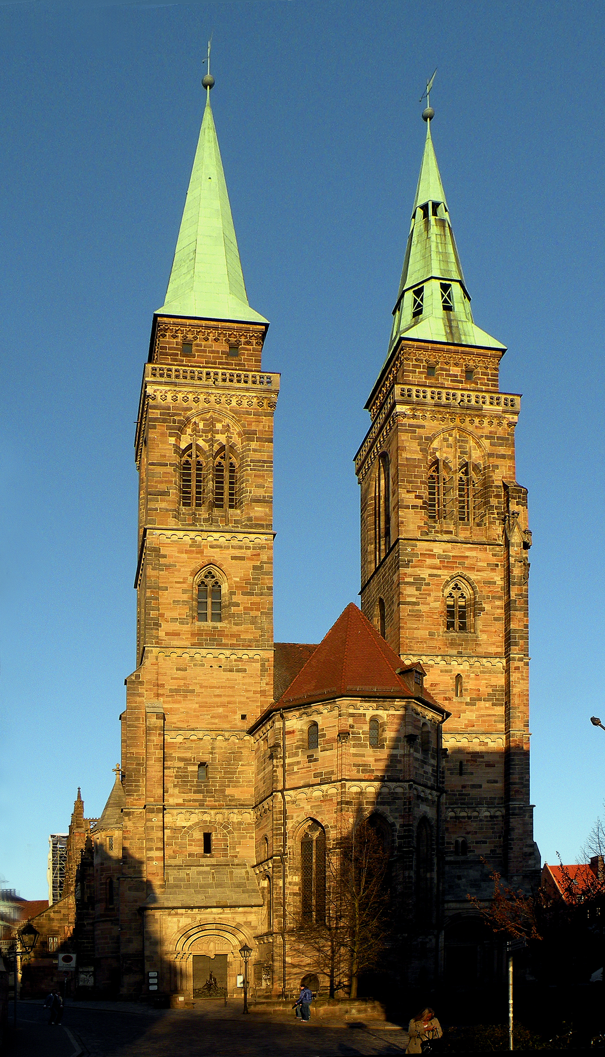 Nuremberg.St. Sebald church.